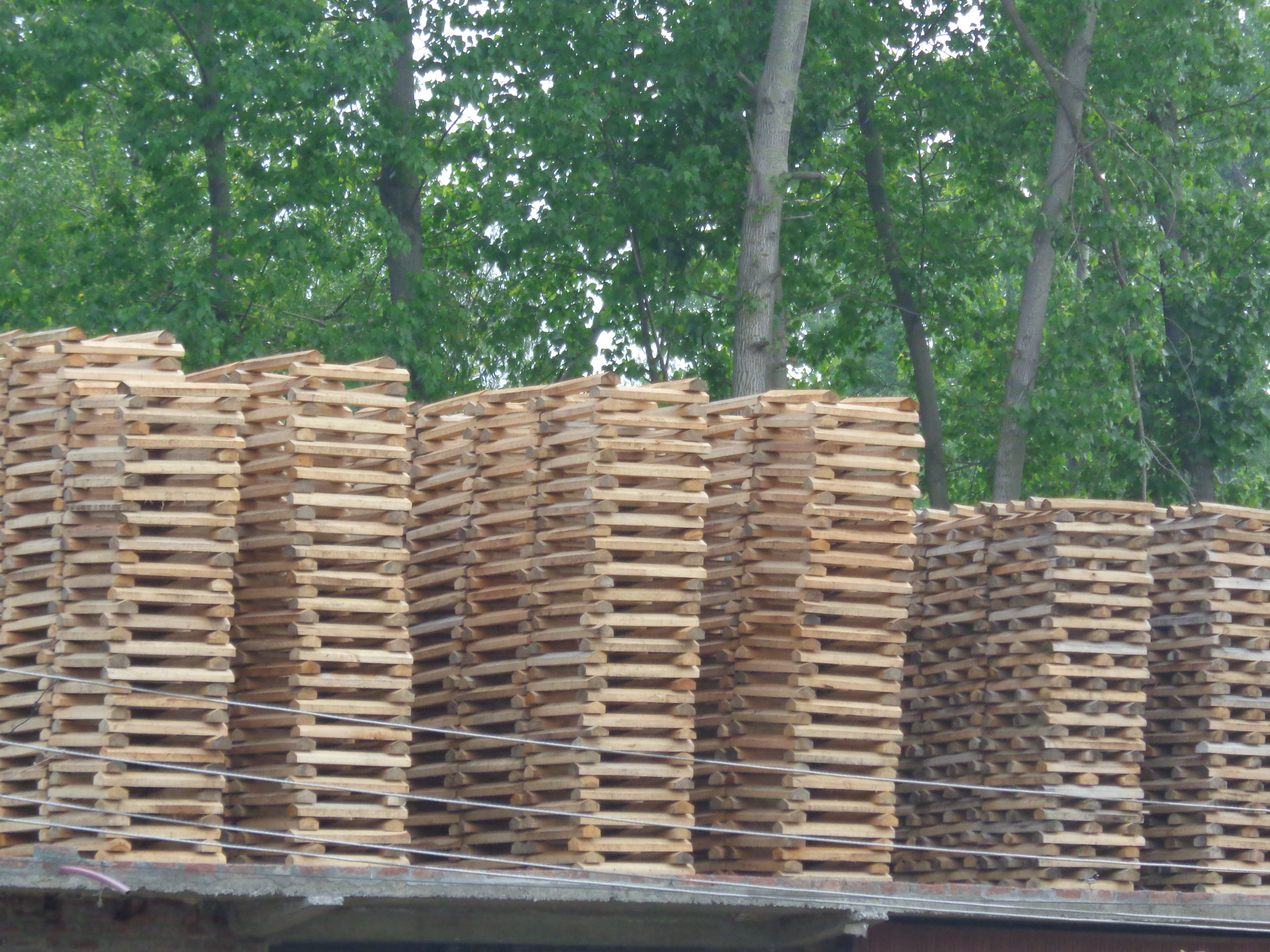 willow peaces put for drying before making bats